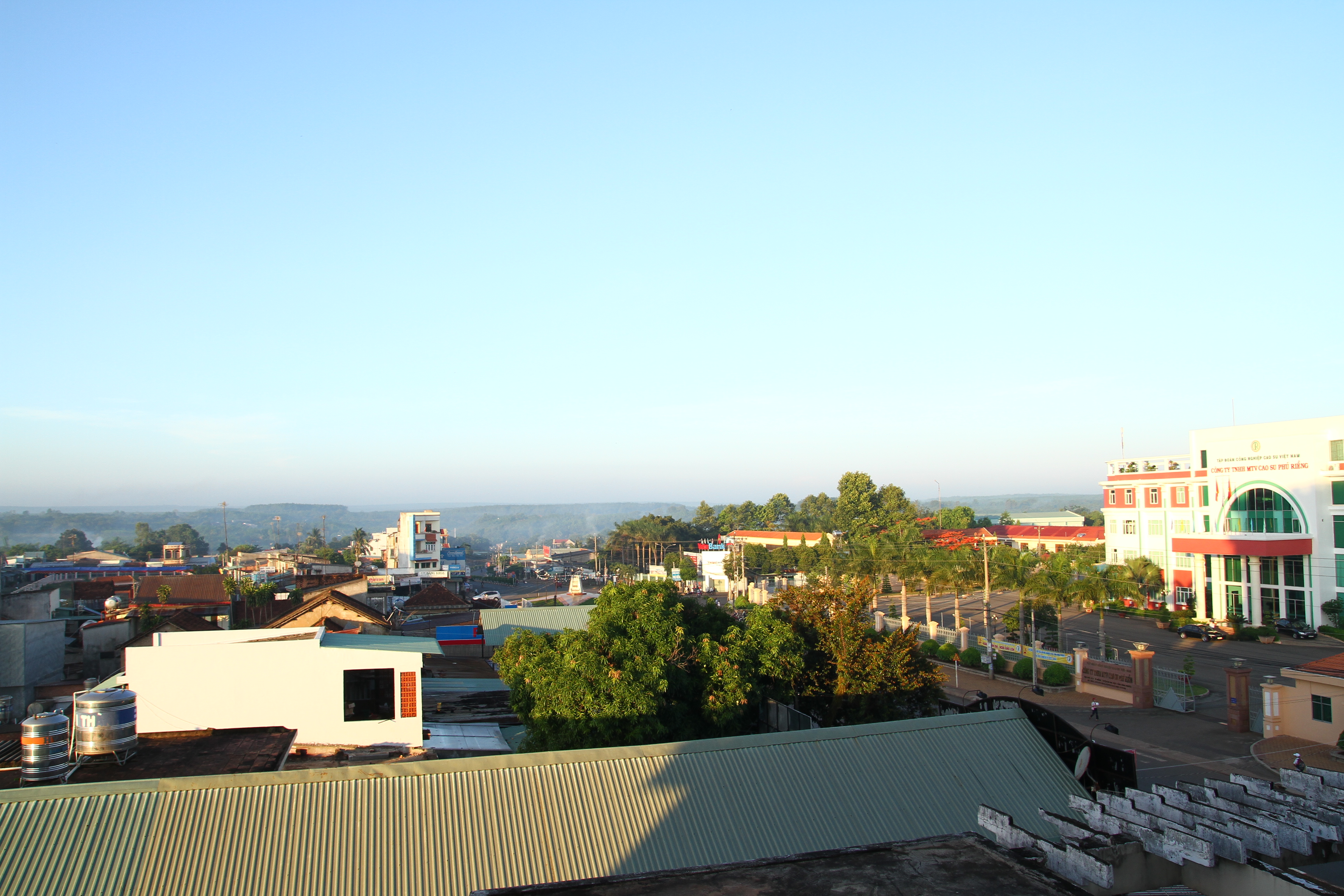 Bình Minh Phú Riềng- Bình Phước